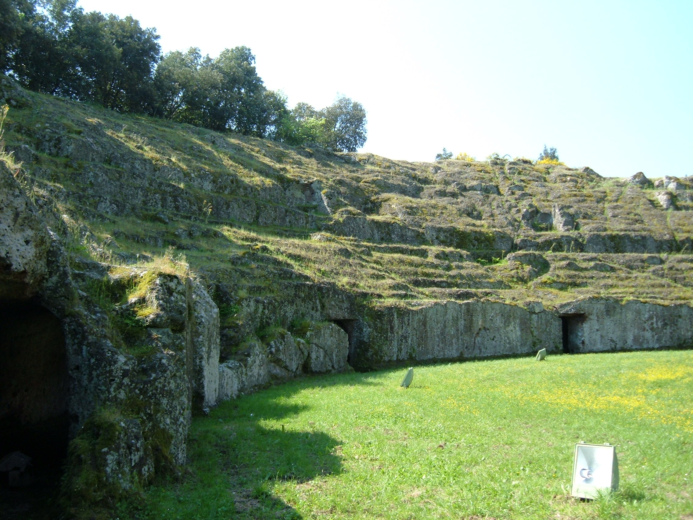 Amphitheater of Sutri.